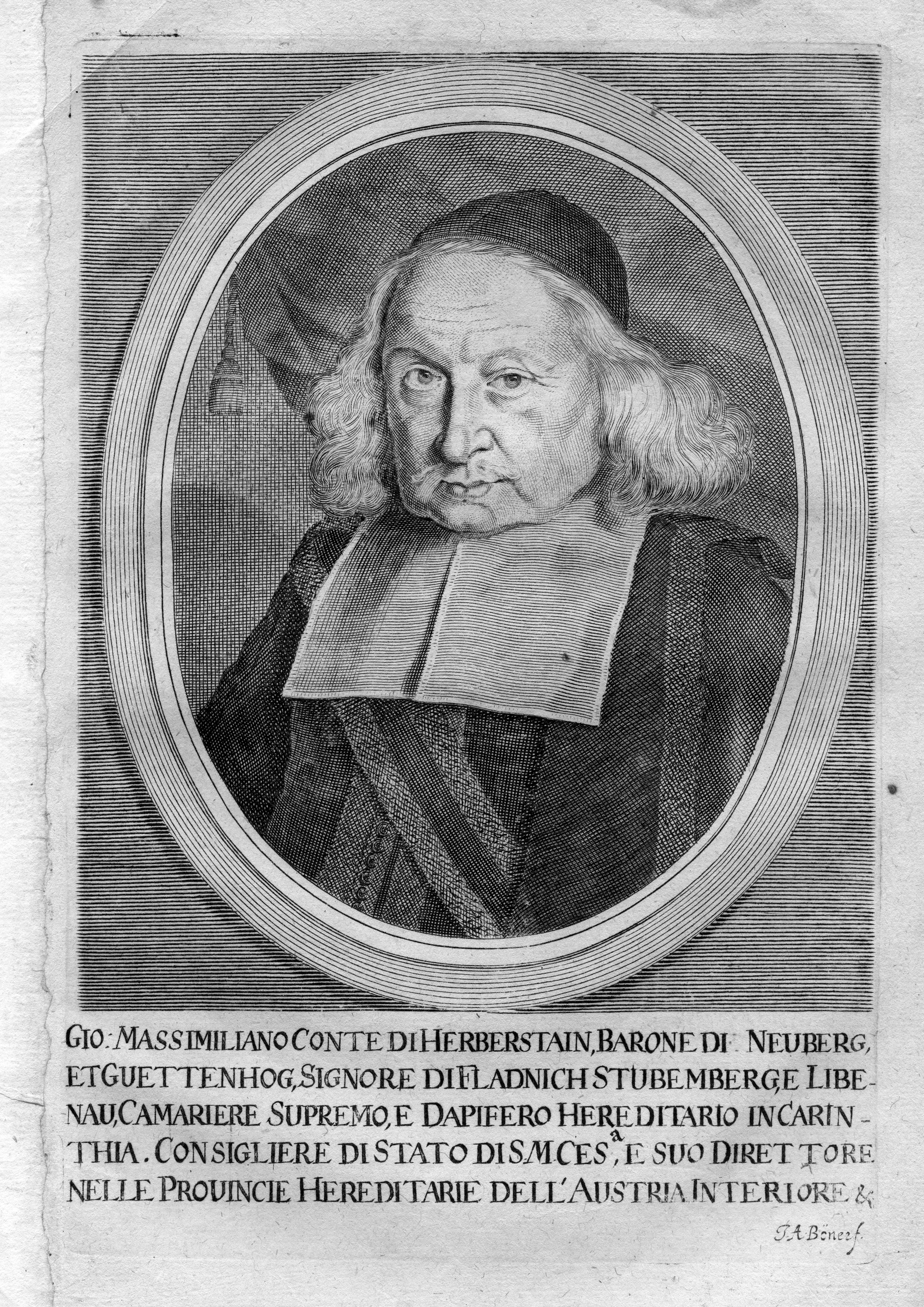 portrait gravé